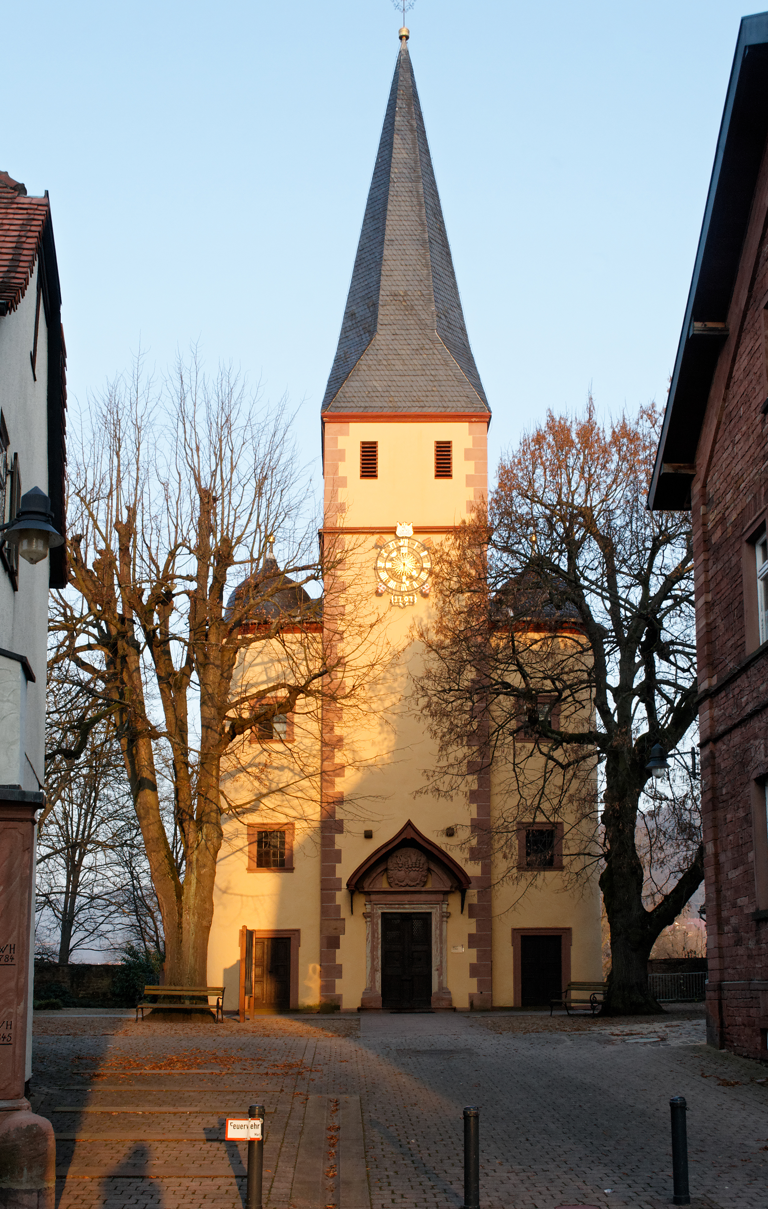 Evangelische Kirche St. Martin in Kleinheubach (Bayern), erbaut 1706–1710